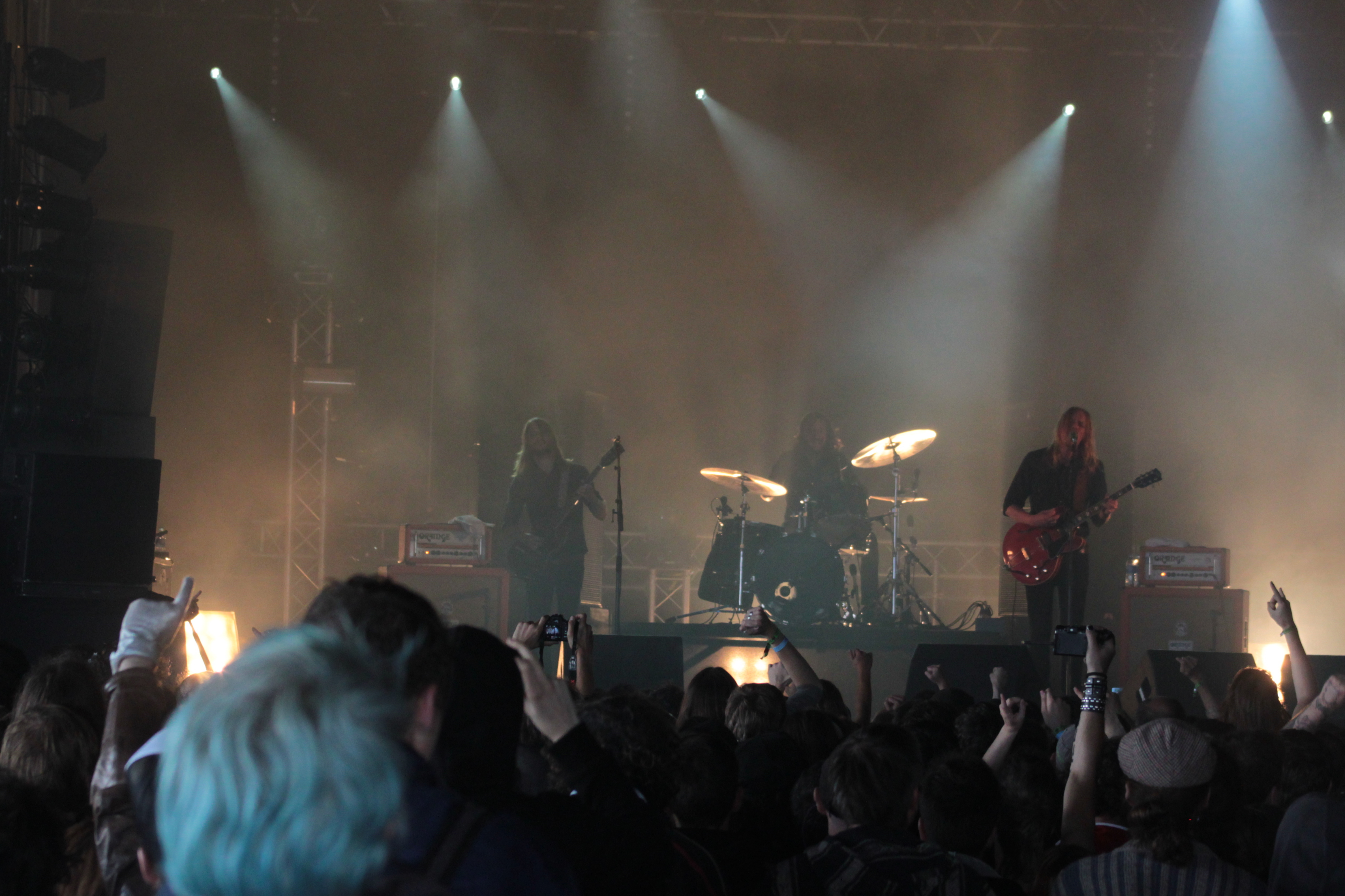 Graveyard, Helfest 2013, Fr-44-Clisson.